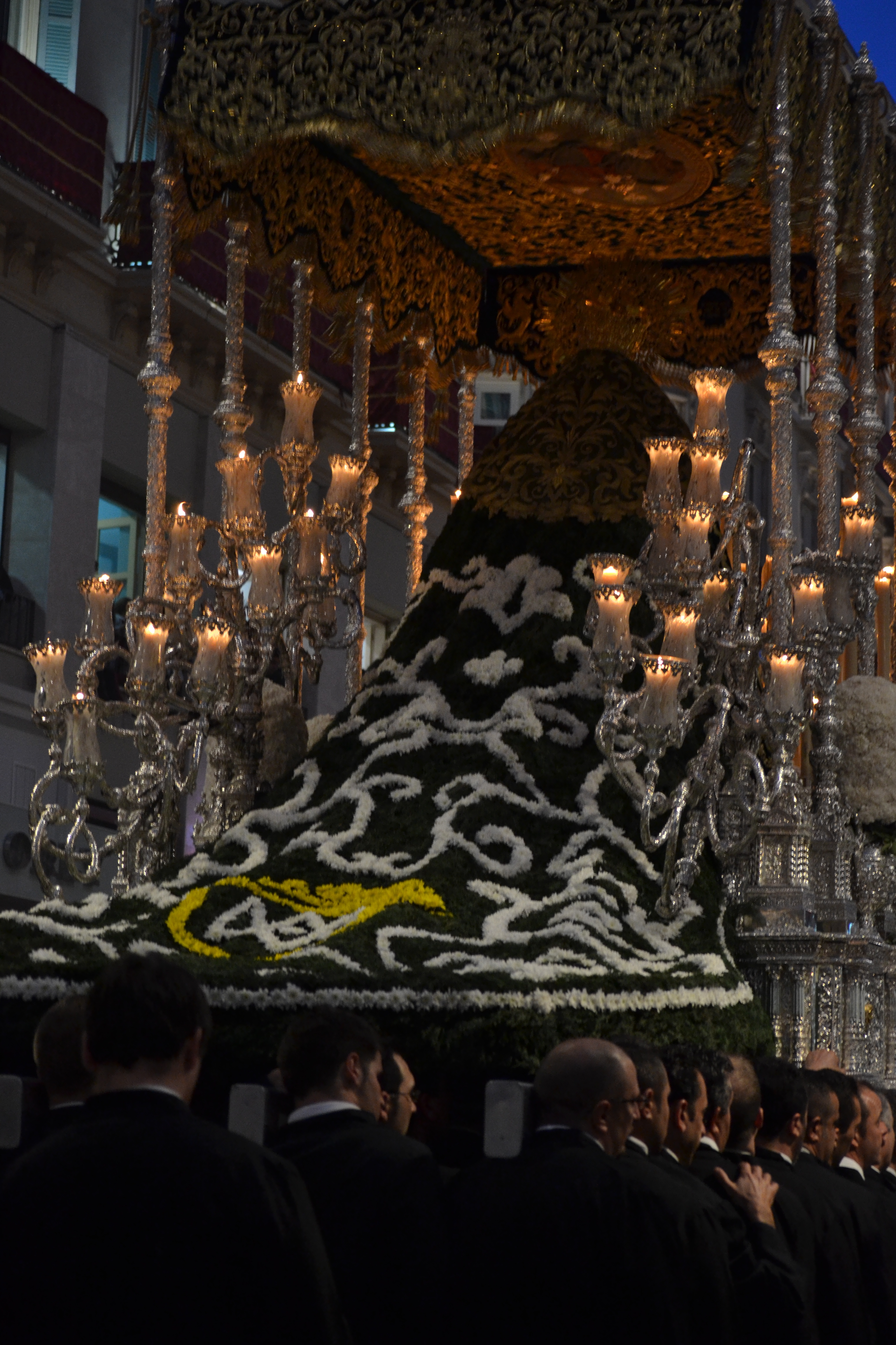 2010 Holy Week in Málaga